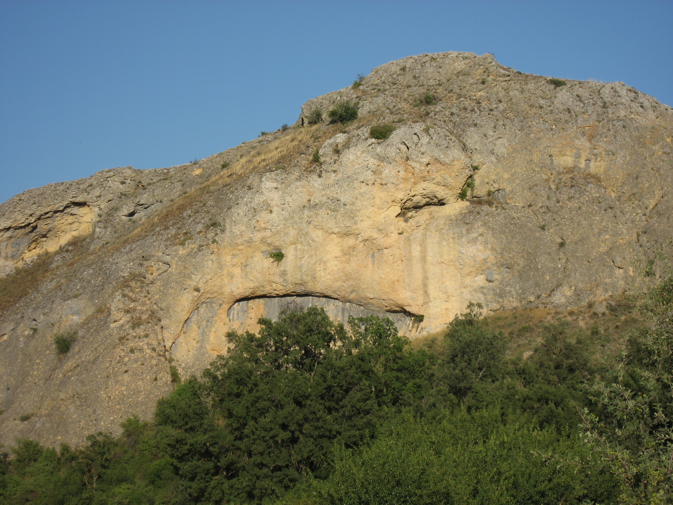 "Peña el Águila", paraje sito en Anguita (Guadalajara). Se halla en el camino que comunica Anguita con Luzón.